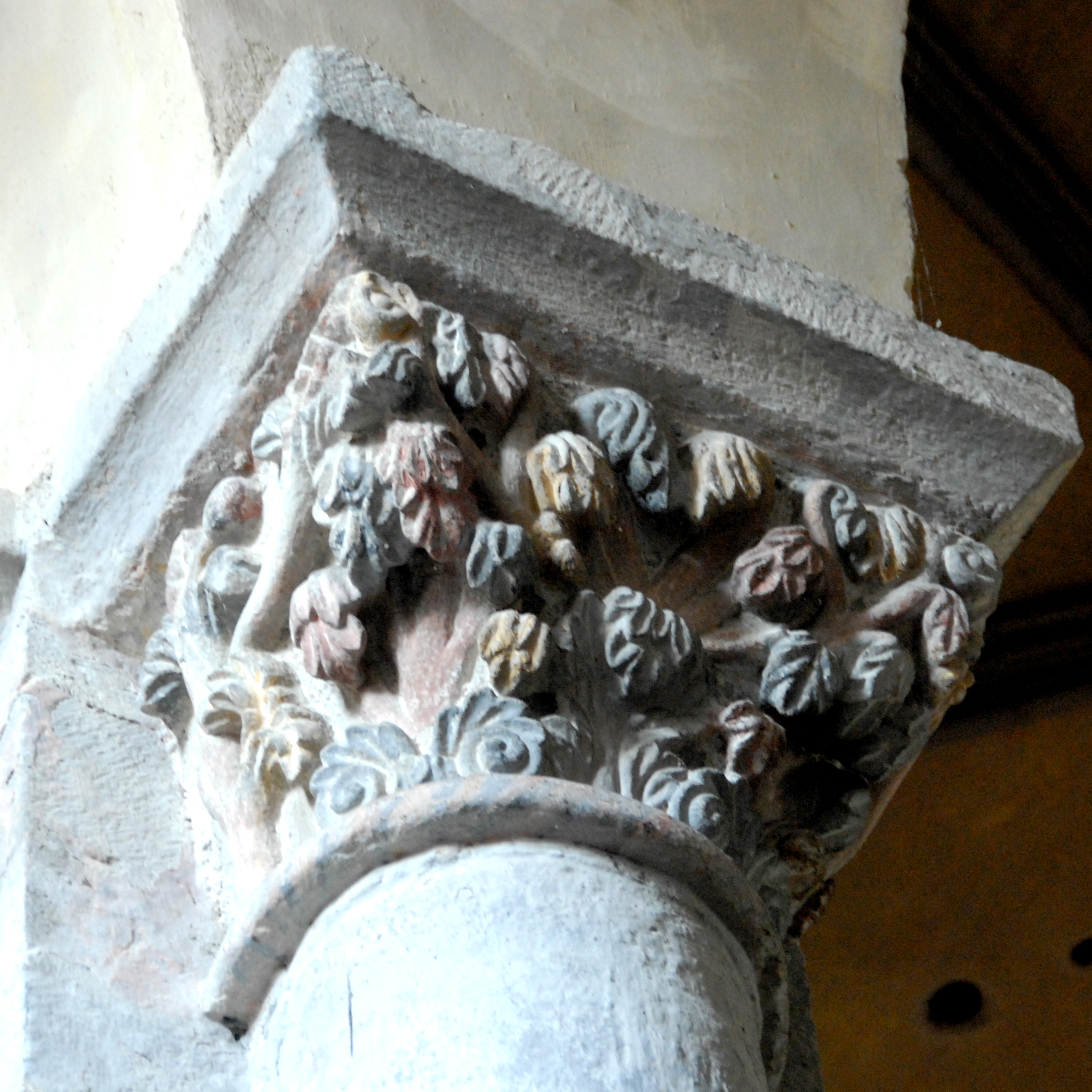 Mozac, Kapitell, Rankenwerk